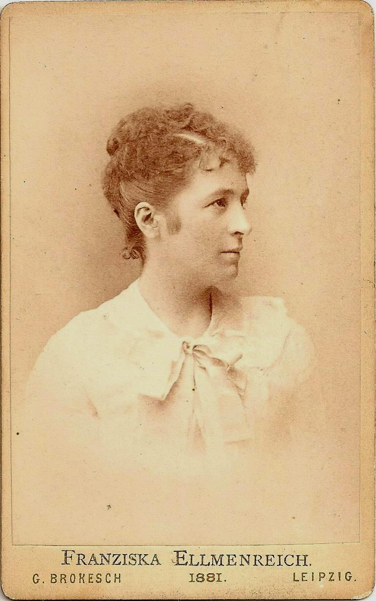 Franziska Ellmenreich in Leipzig 1881